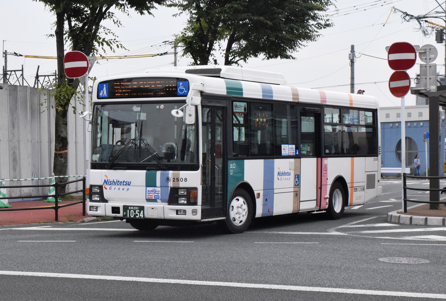 鳥栖駅前を発車する西鉄バス佐賀の車両